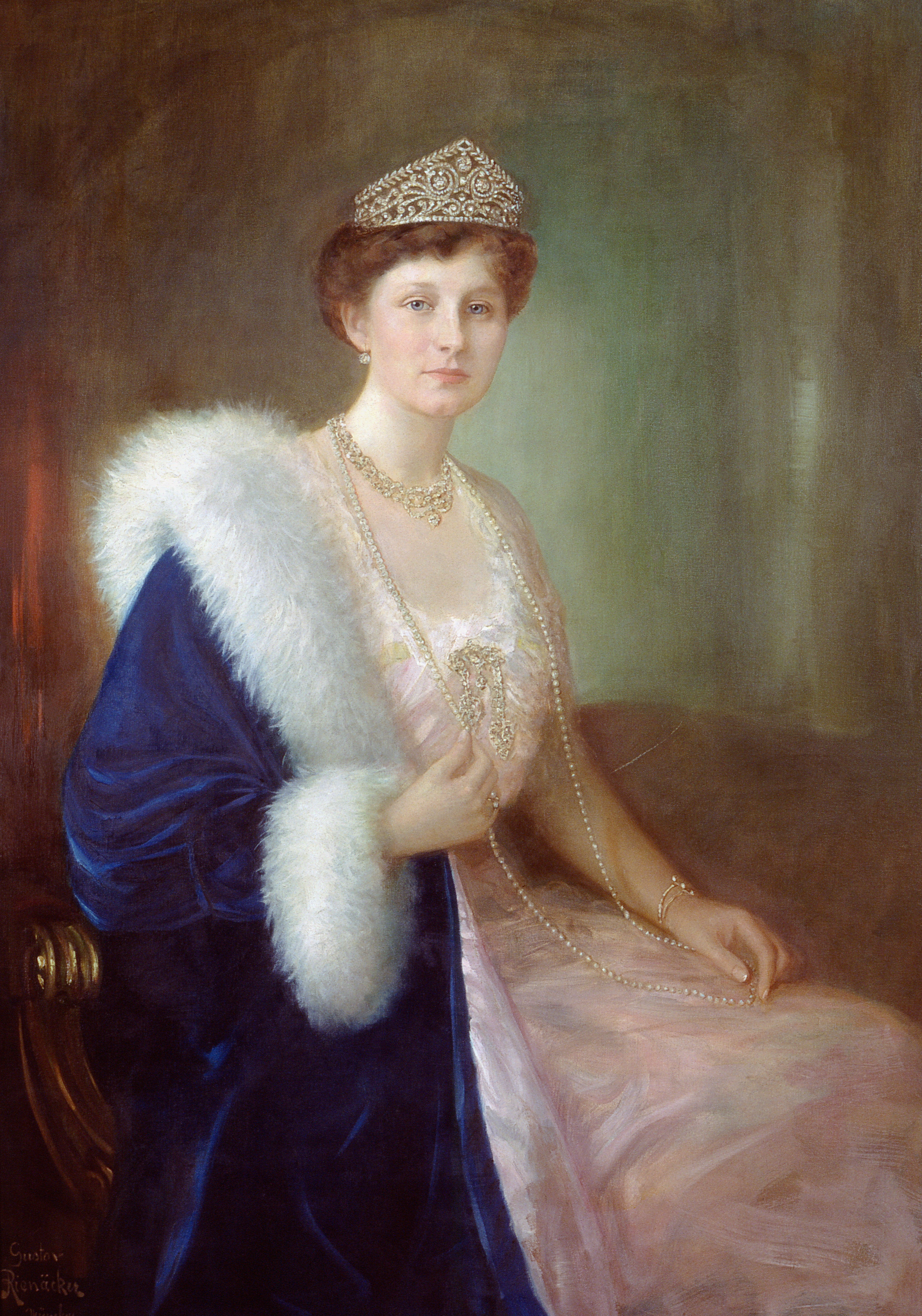 Gustav Rienäcker: Porträt von Viktoria Luise von Preußen (1913)